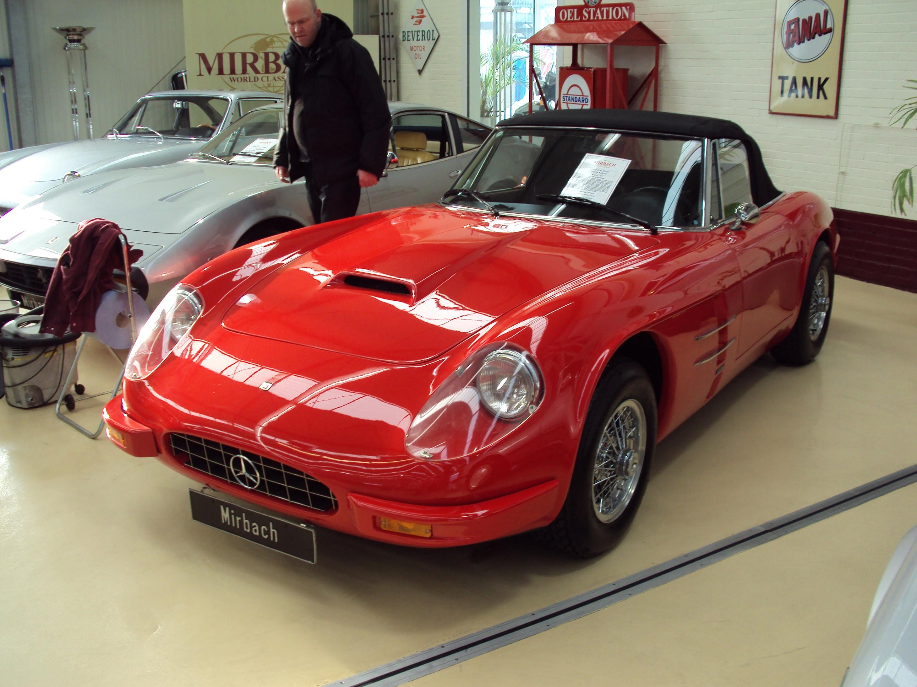 C.F. Mirbach, Hamburg